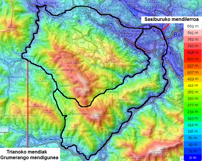 Triano eta Sasiburuko mendilerroen mapa topografikoa.